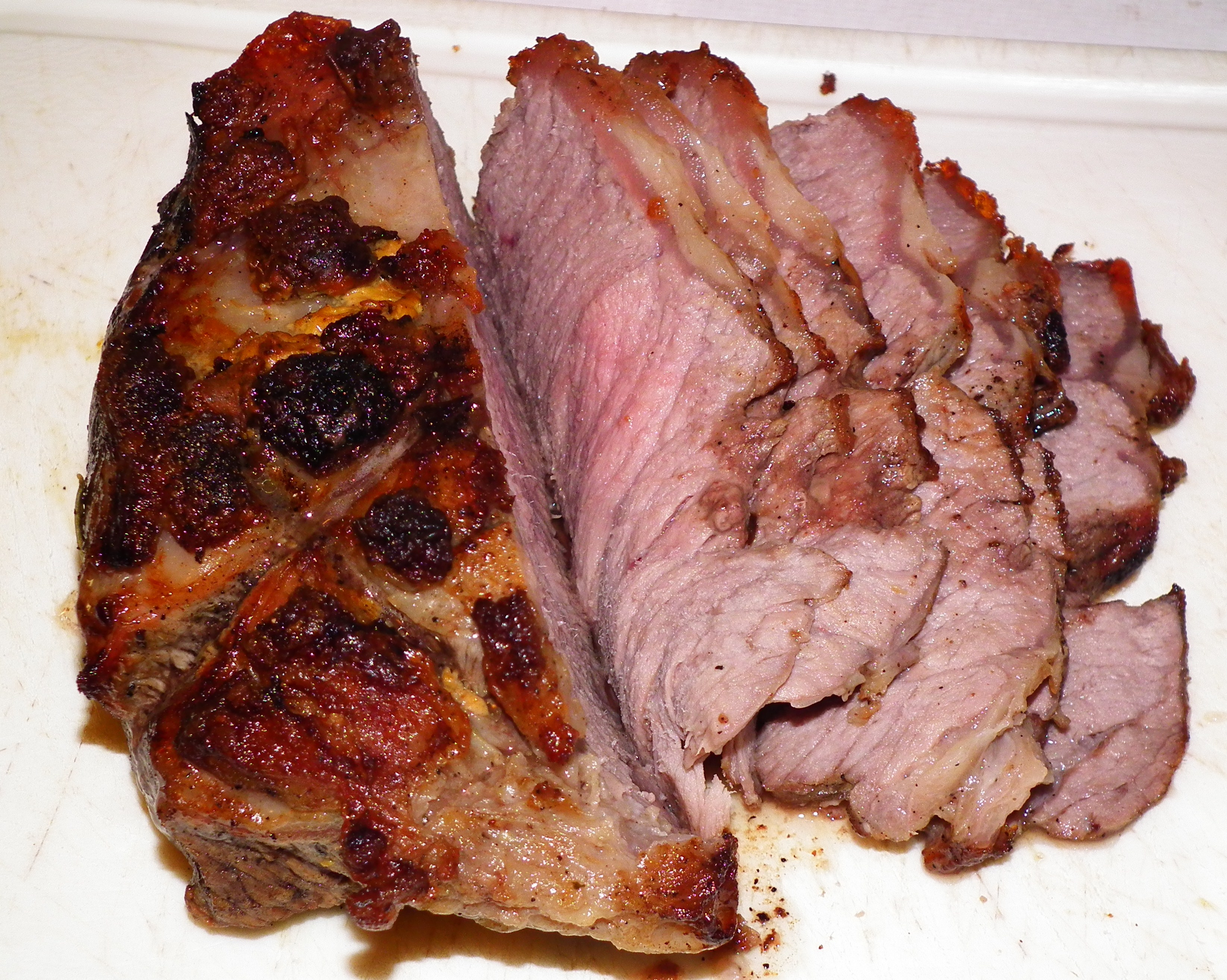 Rinderfilet am Stück